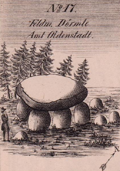 Großsteingrab Dörmte 3